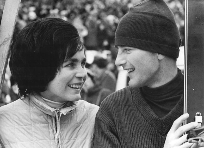 Zentralbild Kohls 23.2.1964 XV. Nordische Skimeisterschaften in Oberhof Neuer deutscher Meister der Spezialspringer wurde am 23.2.64 vor über 40000 Zuschauern auf der neuen "Schanze am Rennsteig" im Kanzlersgrund bei Oberhof Veit Kührt (SC Motor Zella-Mehlis). Nach dem Wettkampf war seine Verlobte Gretel Hess die erste Gratulantin.